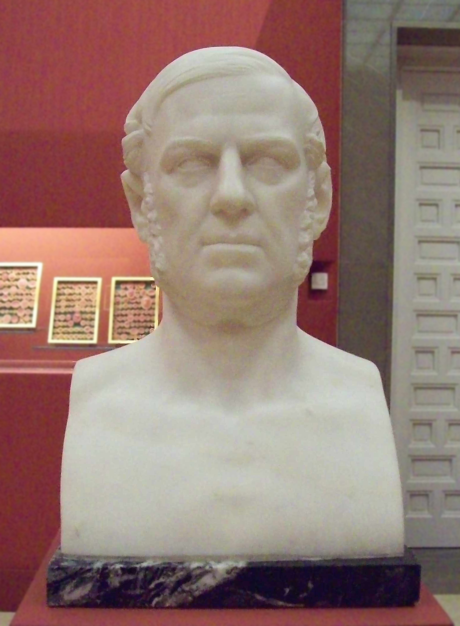 Depicted person: Bernardo López y Piquer (1800–1874).